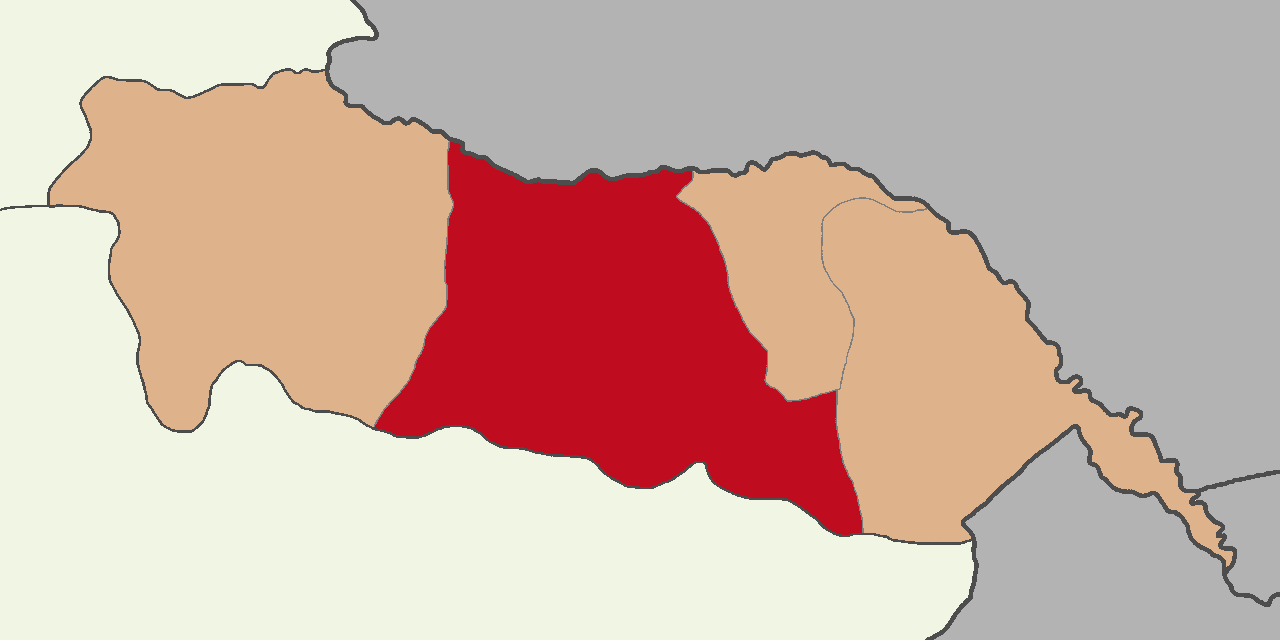 Iğdır Merkez ilçesinin konumu